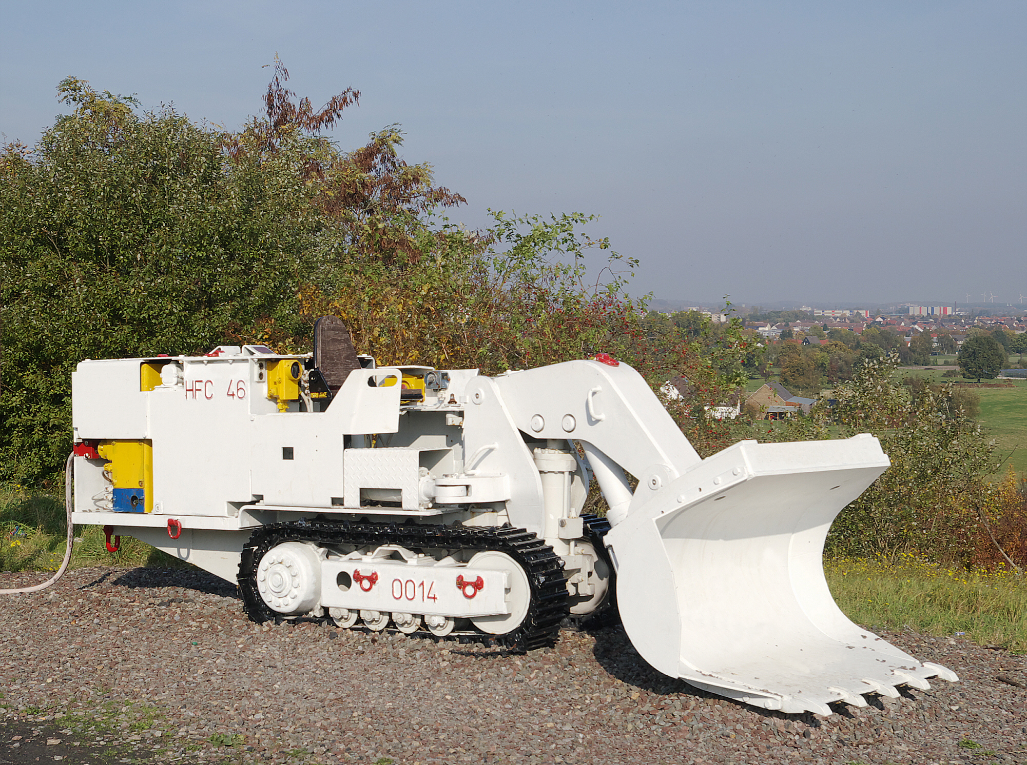 Seitenkipplader EL 600, ausgestellt auf dem Bergbaulehrpfad Kissinger Höhe in Hamm/Westf. Mit dem Seitenkipplader wird in Streckenvortrieben das durch Sprengen gelöste Gestein auf ein Abfürderband geladen. Hersteller: Salzgitter